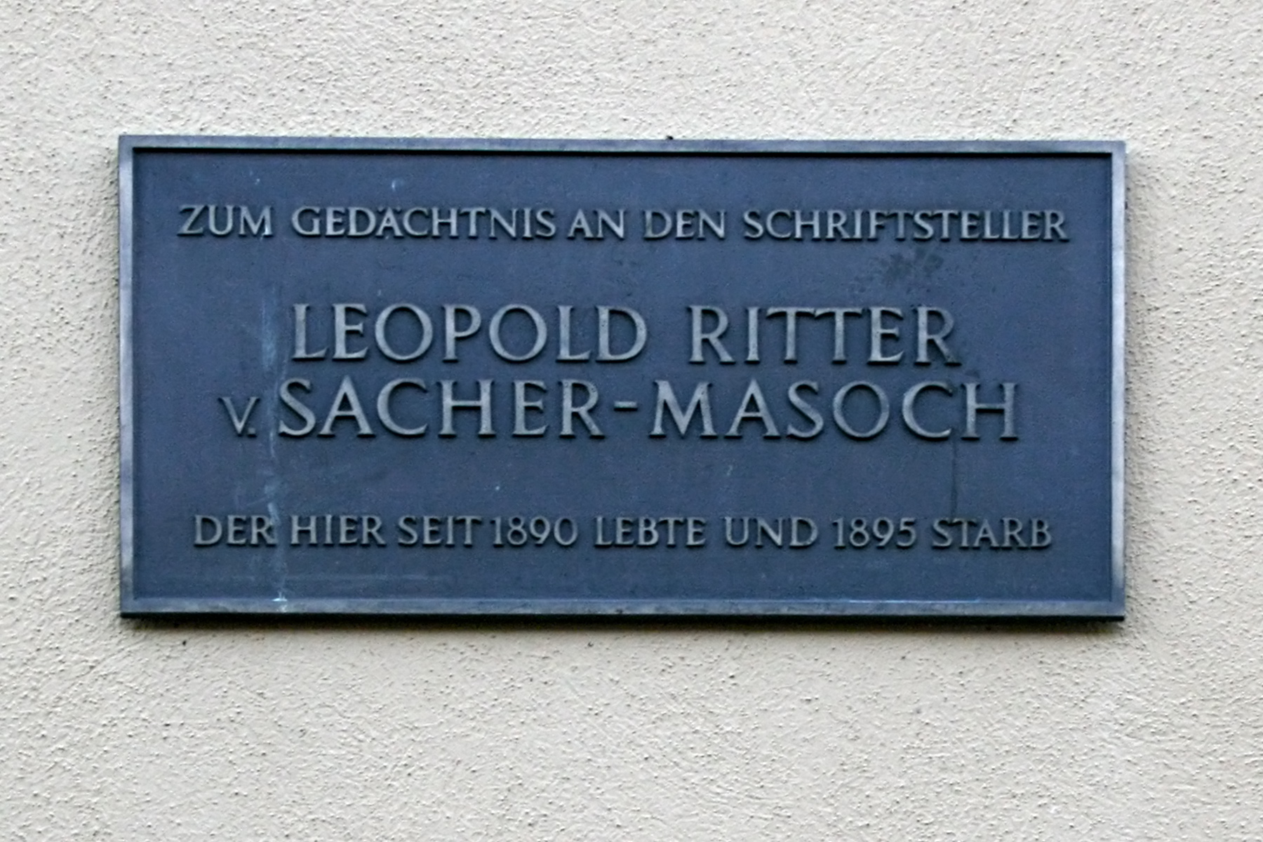 Gedenktafel für Leopold von Sacher-Masoch am Mollerschen Landhaus, Teil des zerstörten Schlosses in Lindheim.